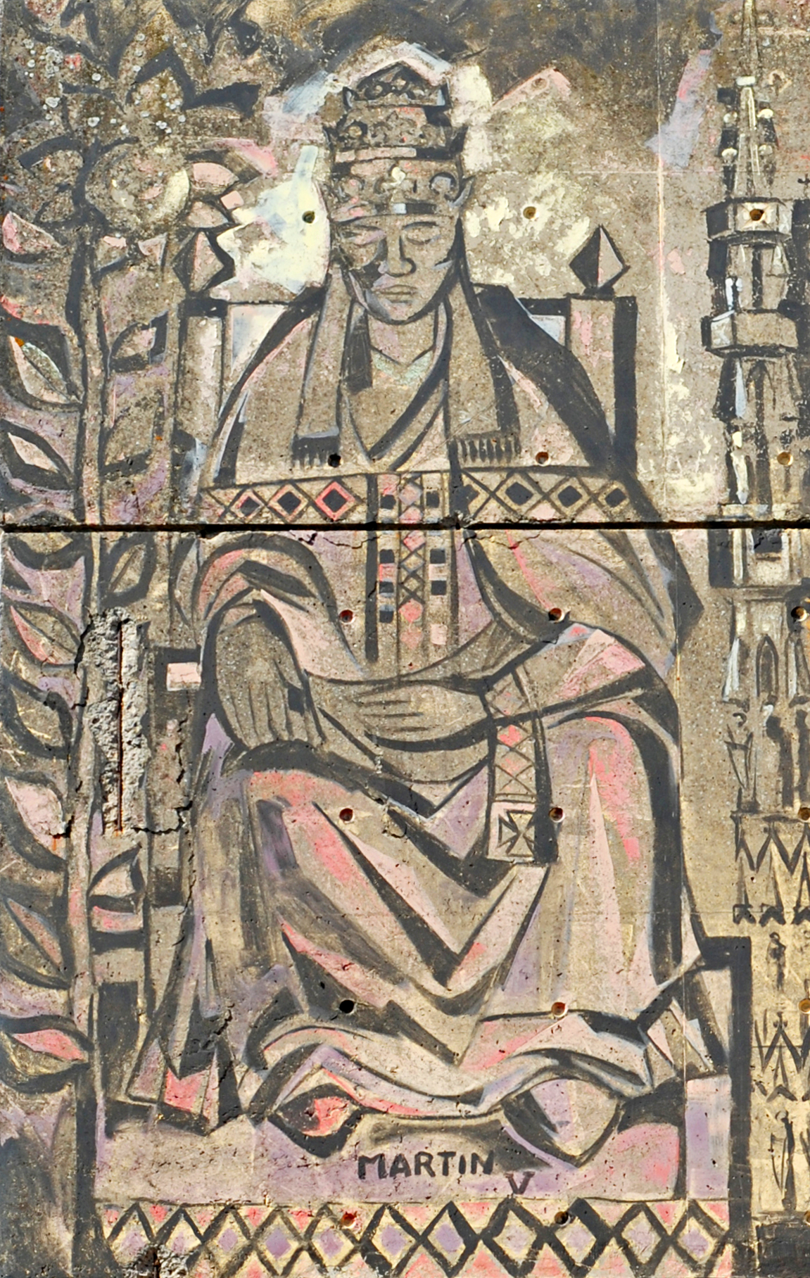 Belgique - Louvain-la-Neuve - Rue de la Lanterne magique - Fresque "Petites histoires d'une grande université" (Claude Rahir 1984) This photo of immovable heritage has been taken in the Walloon Region